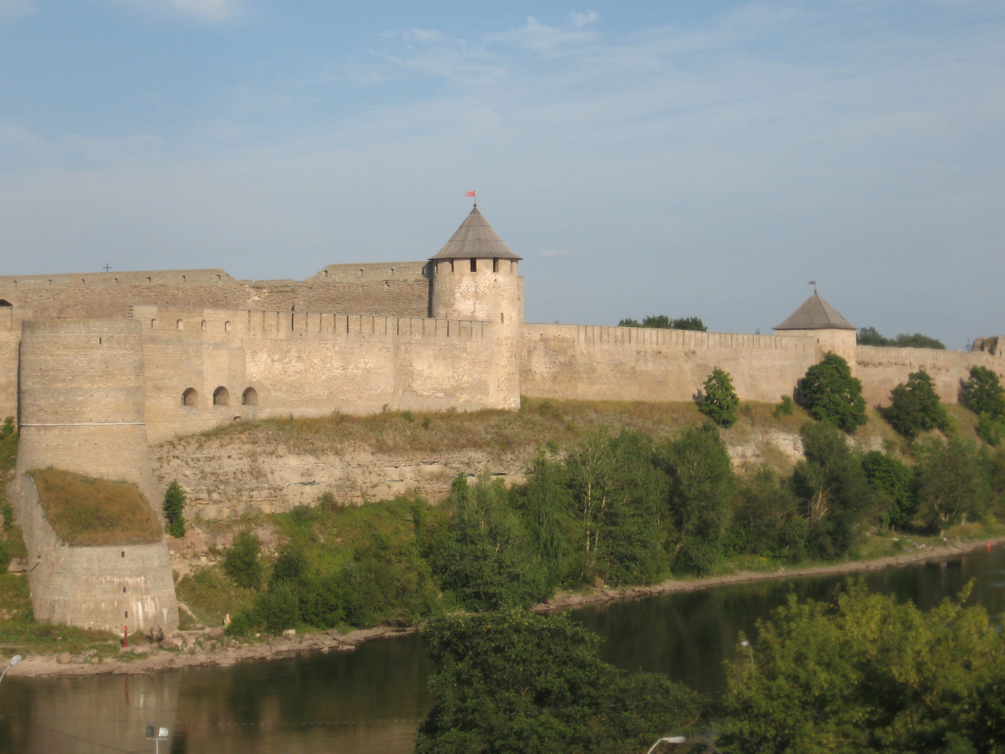 Jaanilinna linnus